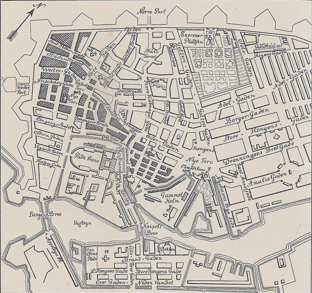 Kort over Københavns brand 1795. Den mørke skravering angiver de dele der brændte.